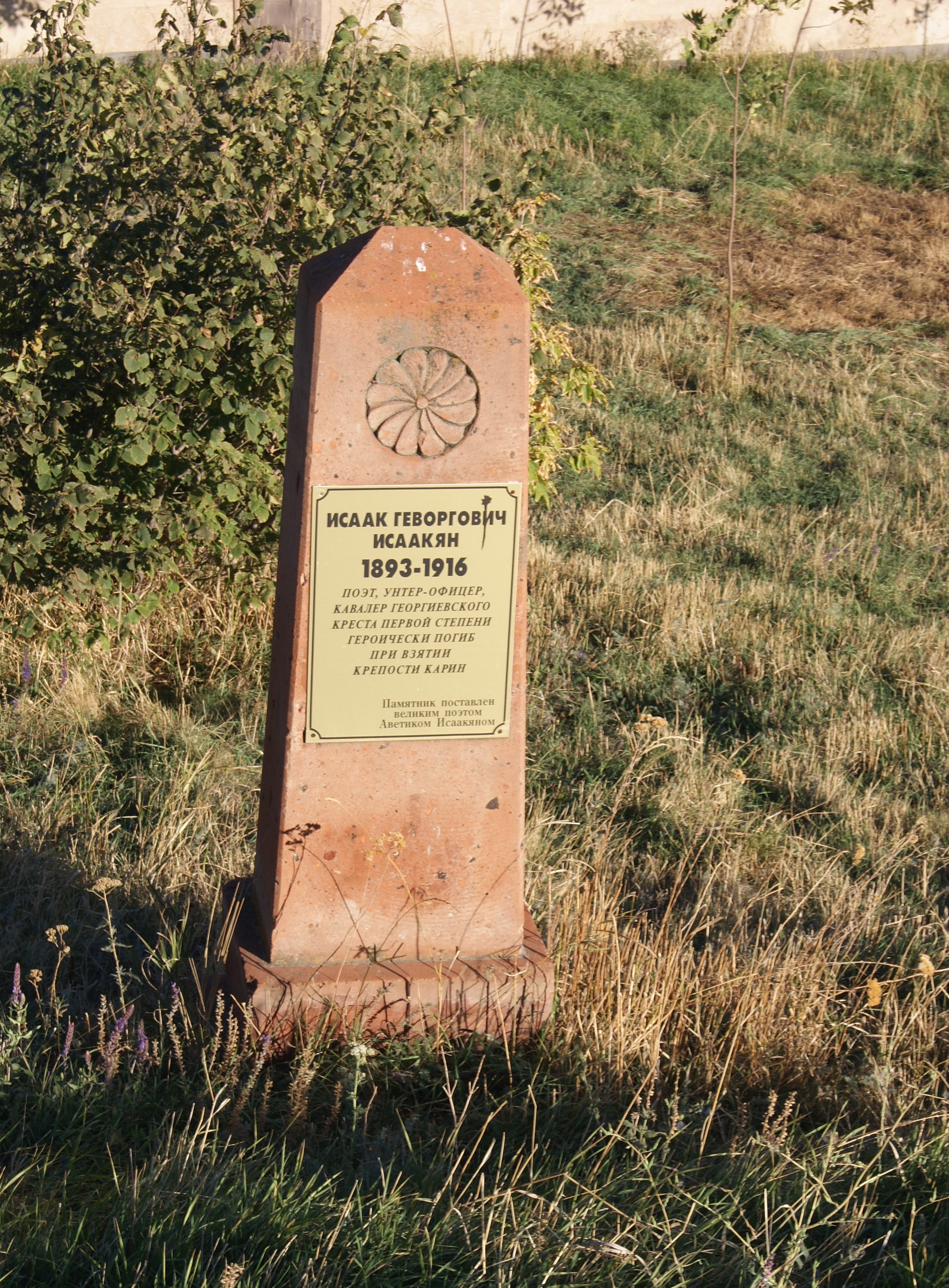 Պատվո բլուր 1/4.892